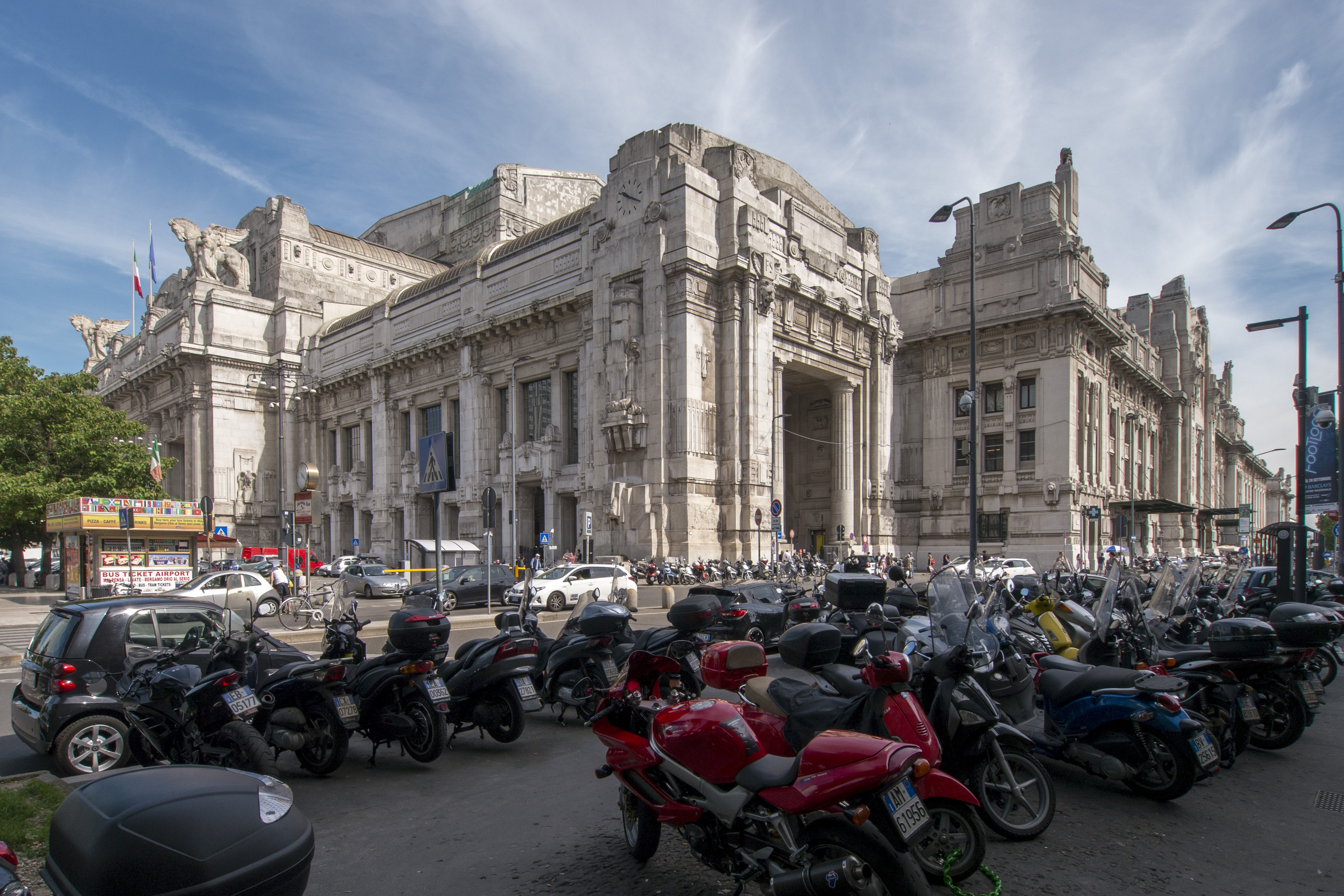 Stazione Centrale, Milano